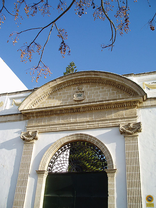 Bodega del Campo de Guía de estilo neoclásico (primera mitad del siglo XIX). El Puerto de Santa María, España.